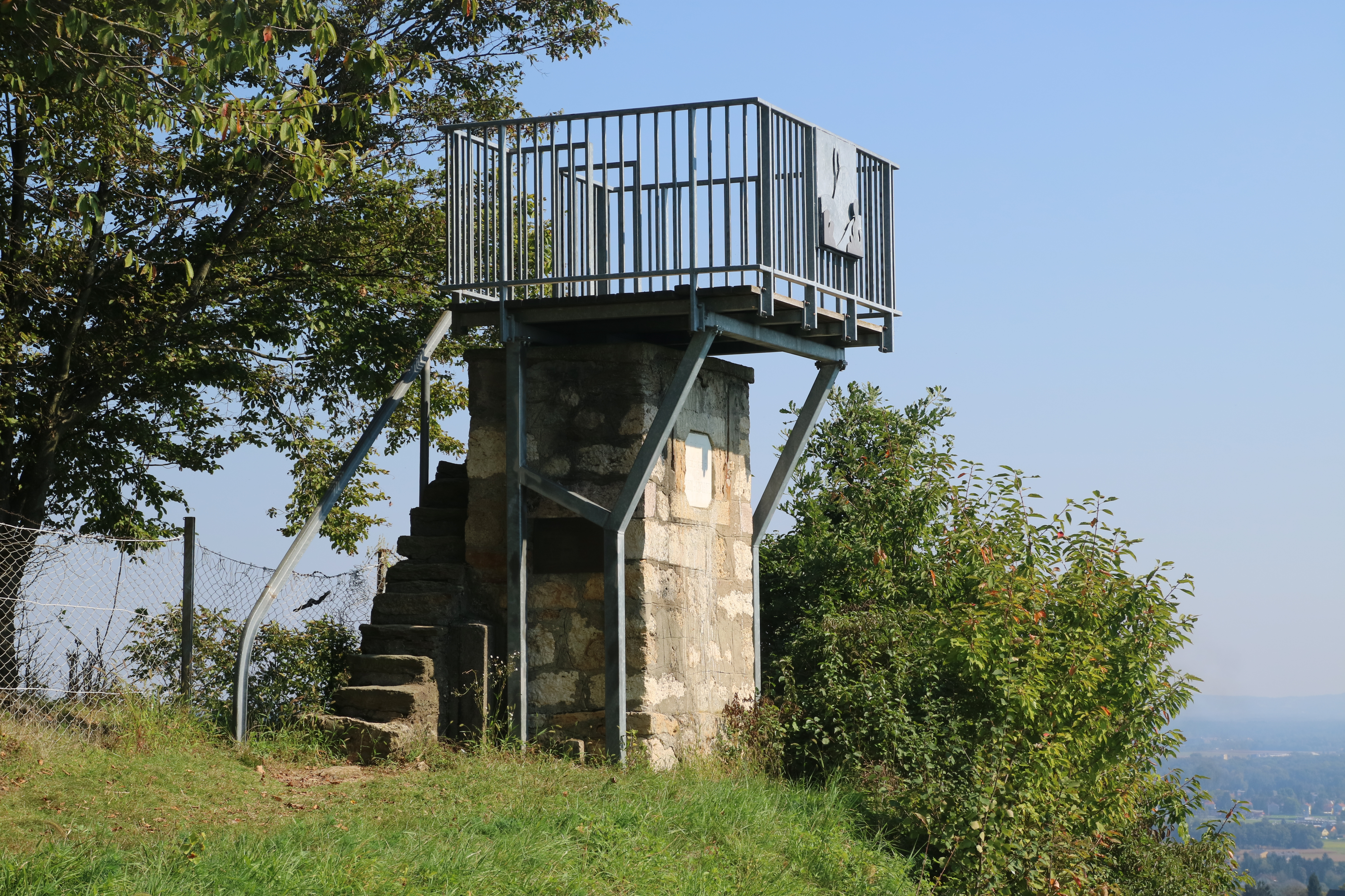 Silberbergwarte von Nordwesten, Gemeinde Leibnitz (Südsteiermark)